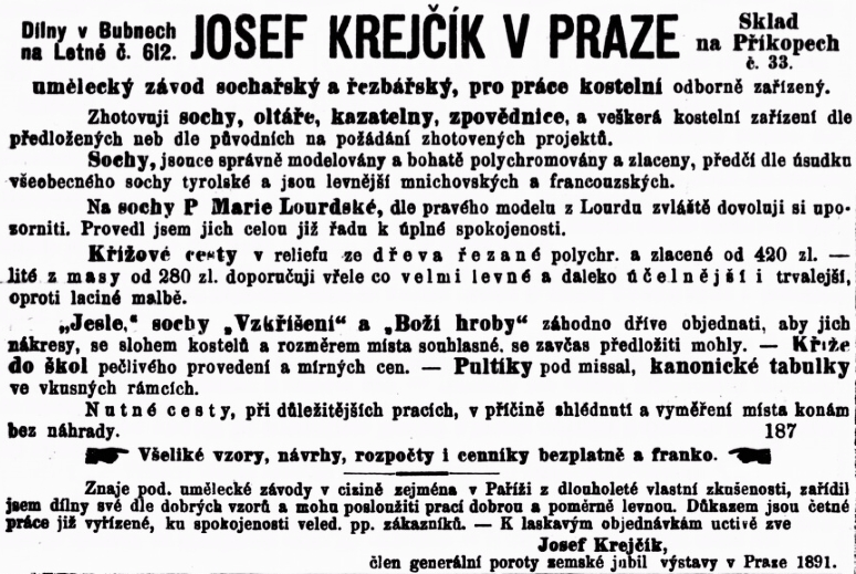 Reklama řezbáře Josefa Krejčíka v časopise Čech: politický týdenník katolický z roku 1893.